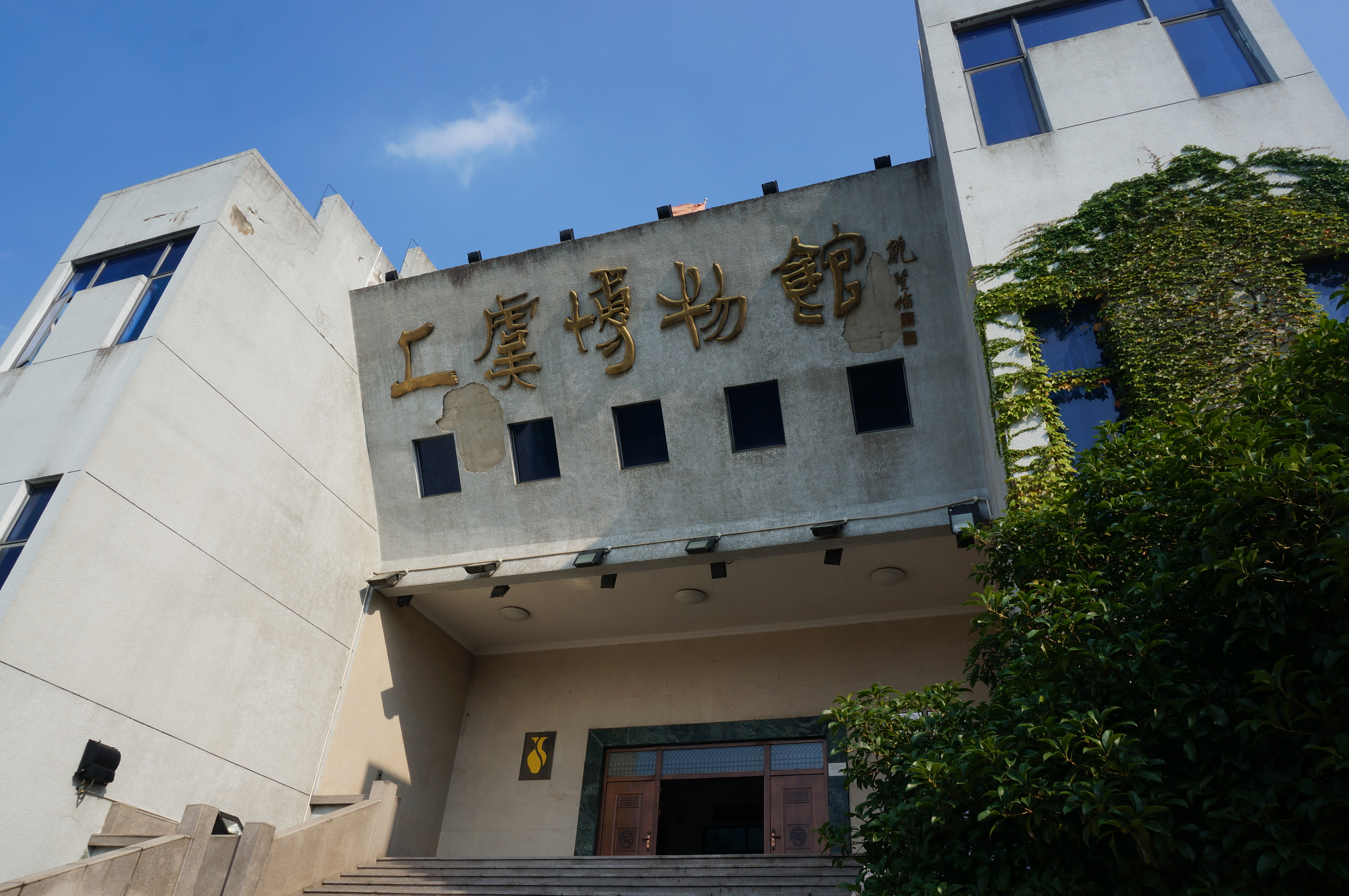 上虞博物馆，正面。